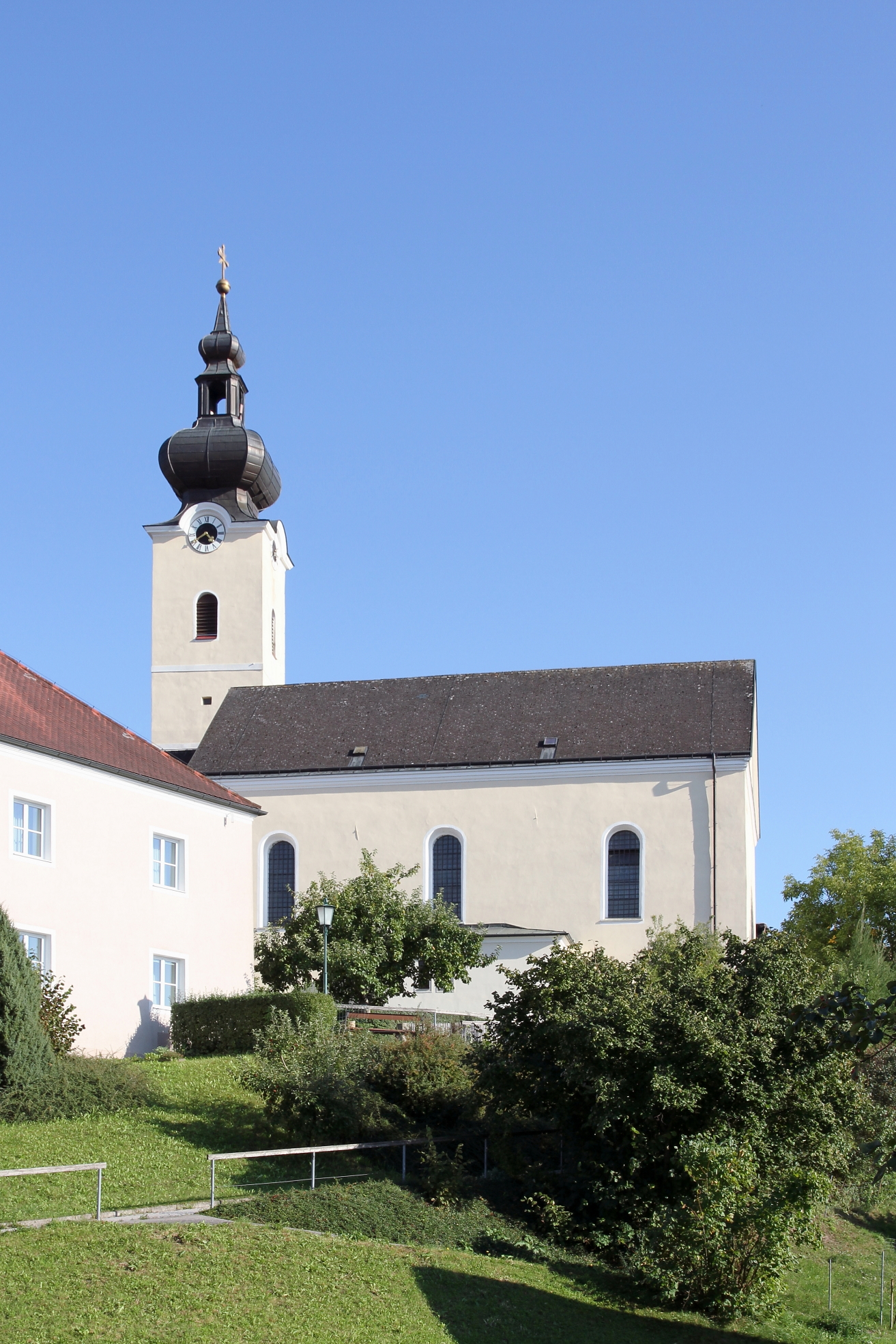 Pfarrkirche hl. Ägidius in der niederösterreichischen Marktgemeinde Oberndorf an der Melk. Eine frühbarocke Hallenkirche, die im Kern gotisch ist und einen gotischen Chorseitenturm mit jüngeren Aufbauten hat. Die Einrichtung ist vorwiegend Barock beziehungsweise Neobarock.